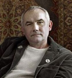 Darvasi László magyar pedagógus, költő, író, újságíró, szerkesztő.